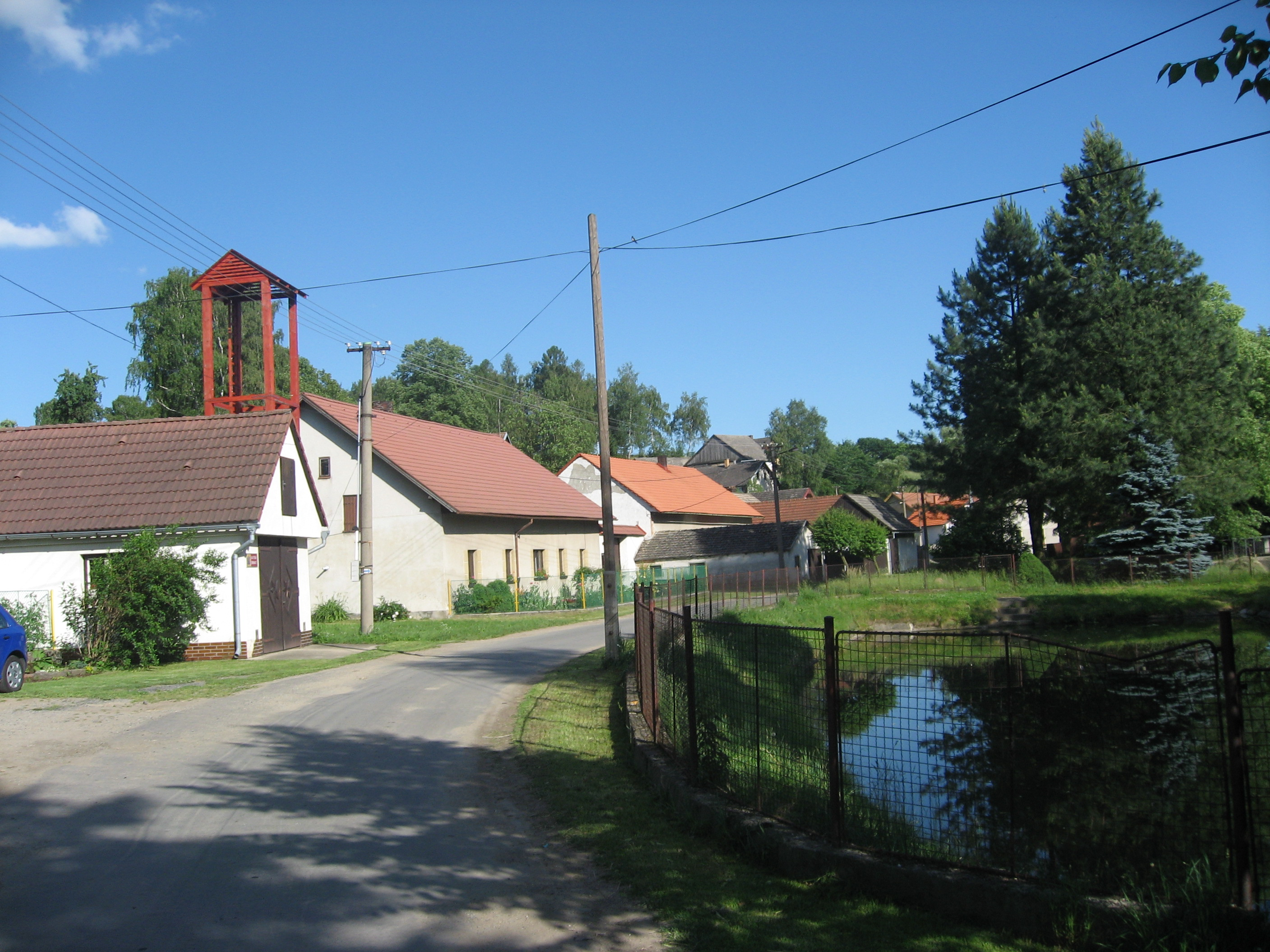 Věžnička